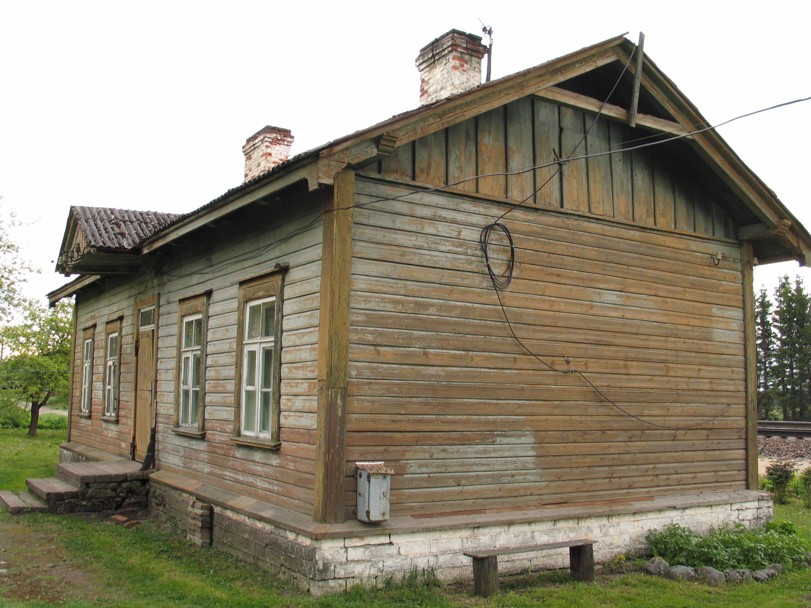 Kulli raudteepeatuse raudteeliste elamu